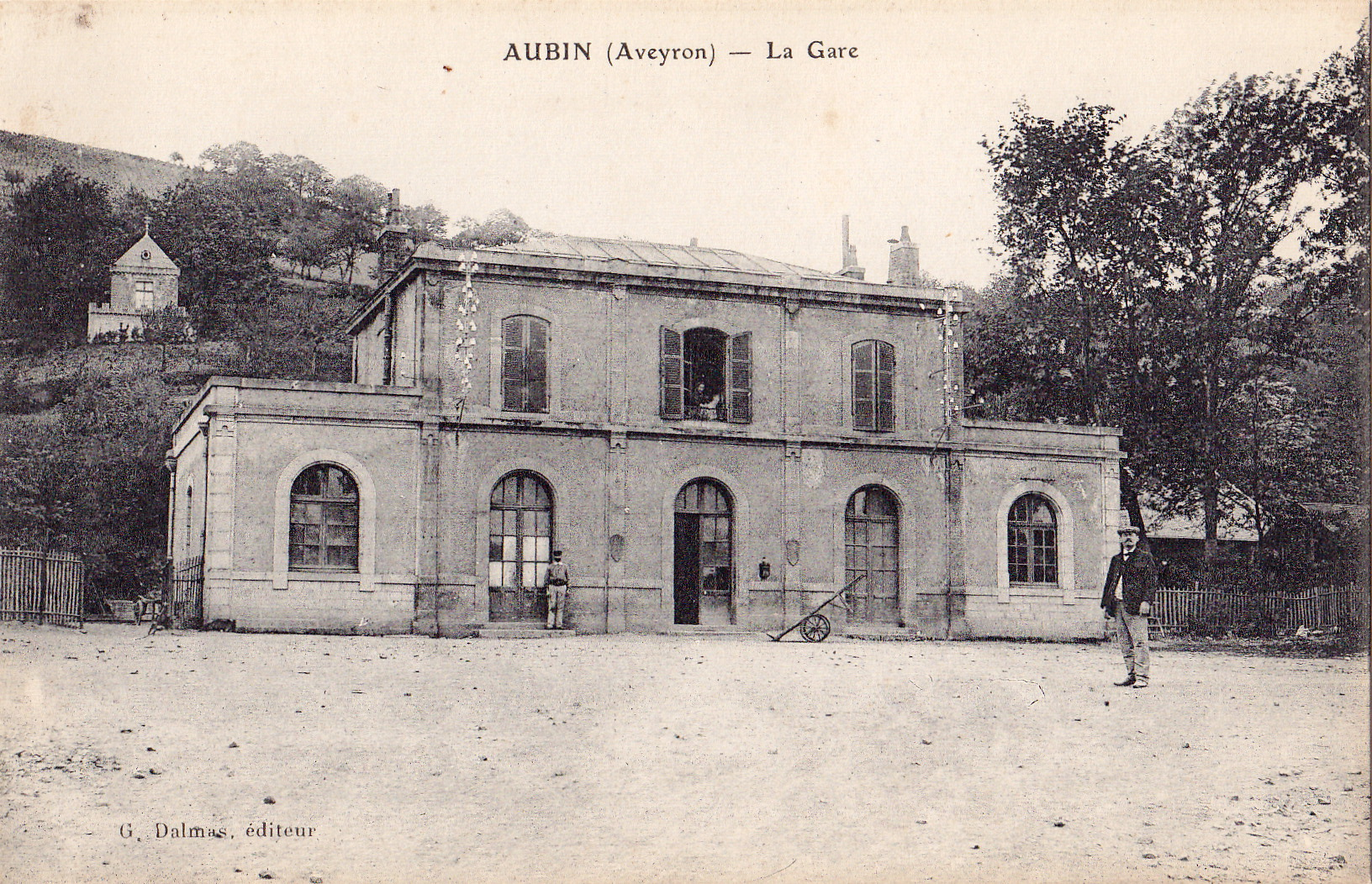 Carte postale ancienne éditée par G. Dalmas :AUBIN - La Gare